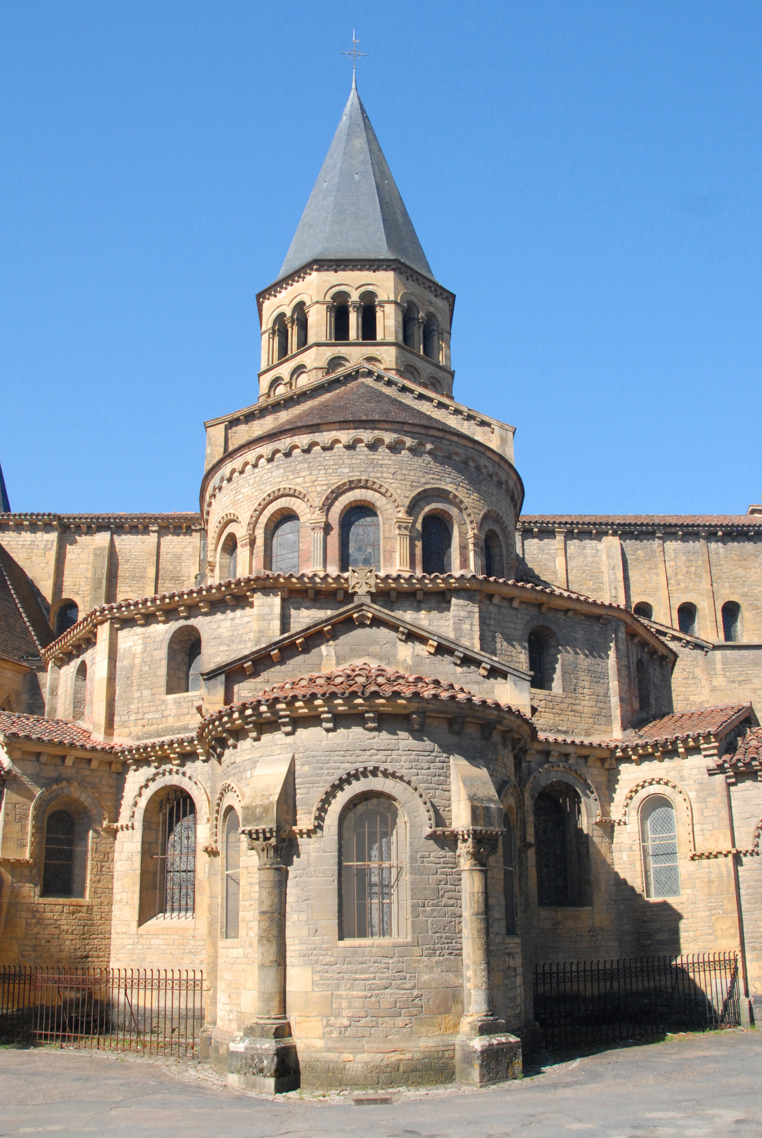 Chorhaupt u. Querhaus von O